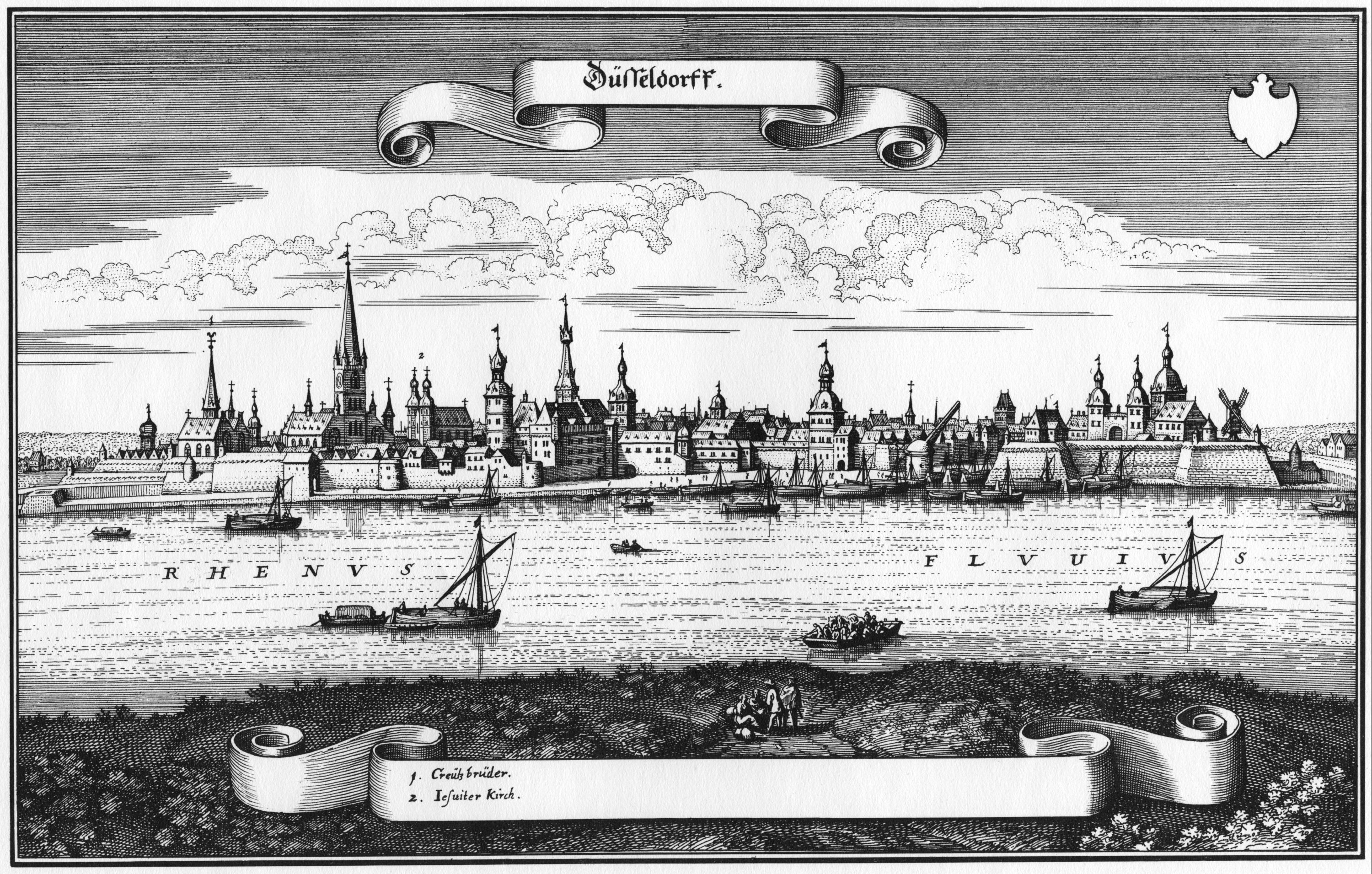 Ansicht der Stadt Düsseldorf (Ansicht von Westen) von Matthäus Merian d. Ä. (1640). Kupferstich, Maße 20,2 × 32,1 cm.